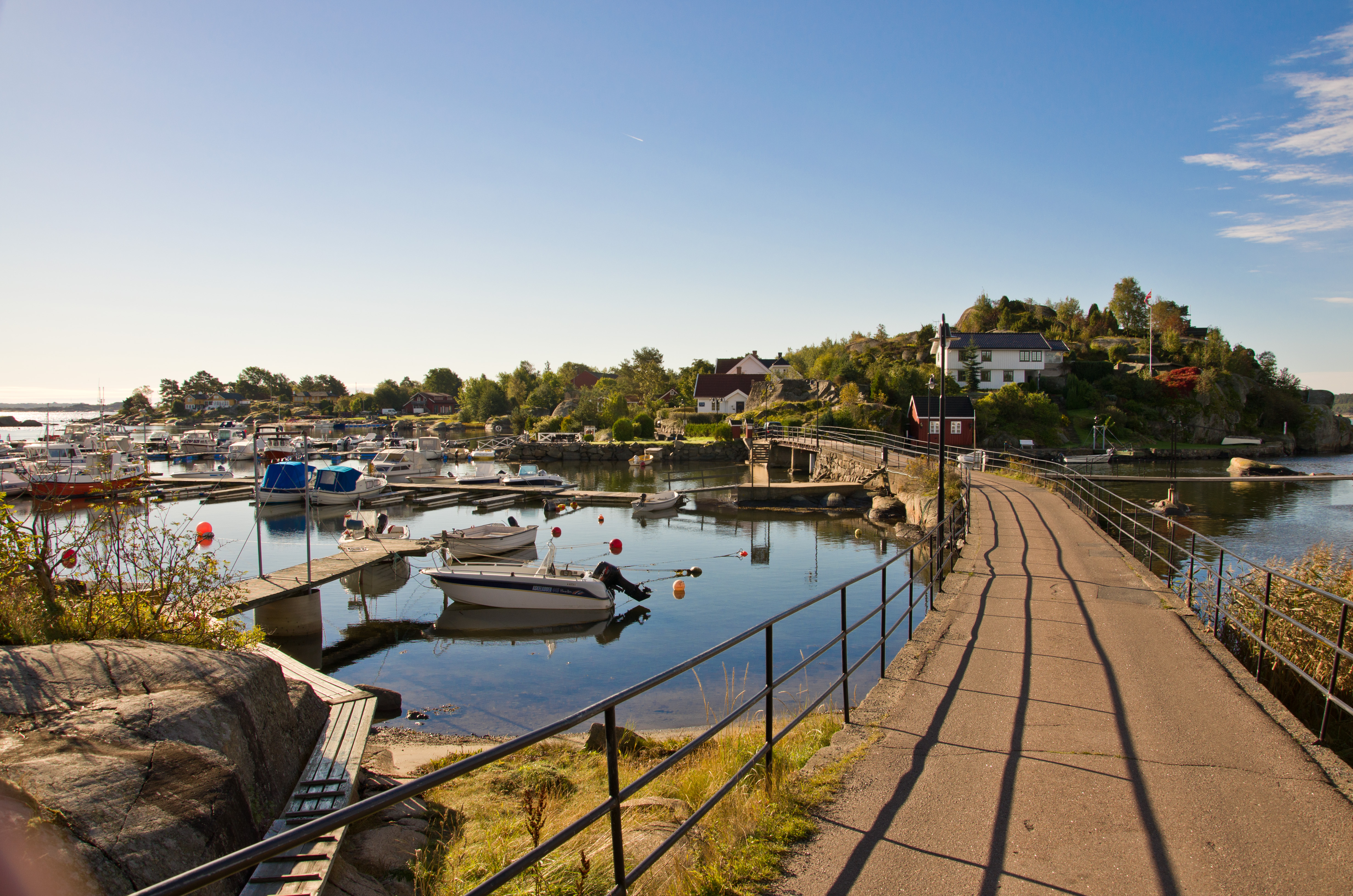 Natholmen, Sandefjord, Vestfold, Norge